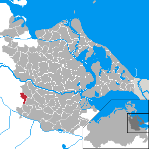 Krusenfelde, Landkreis Ostvorpommern, Mecklenburg-Vorpommern